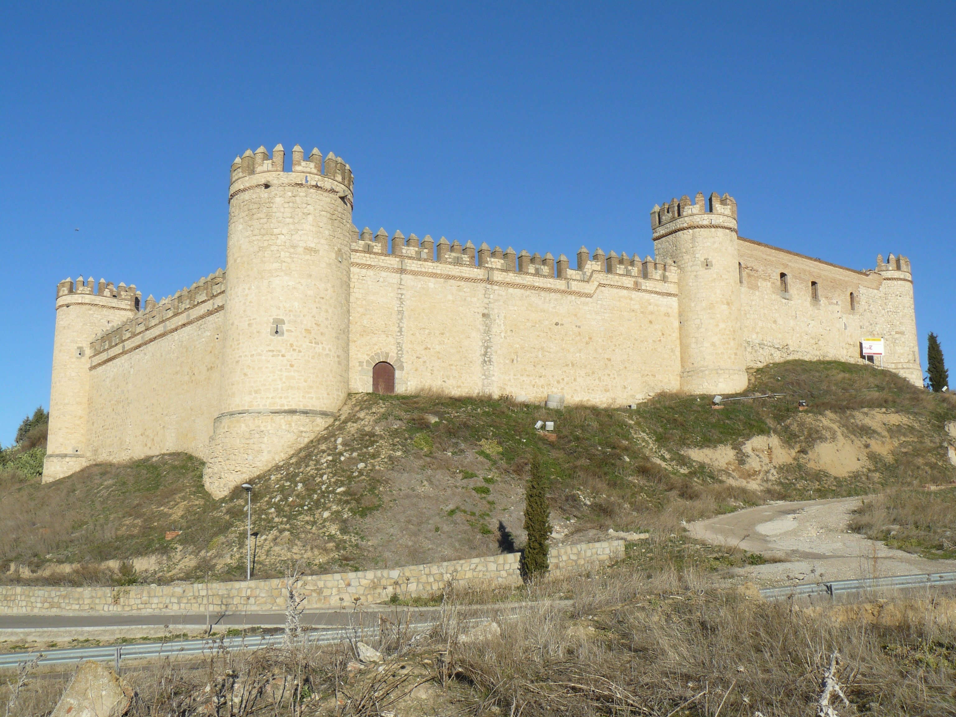 Castillo de Maqueda, Toledo.